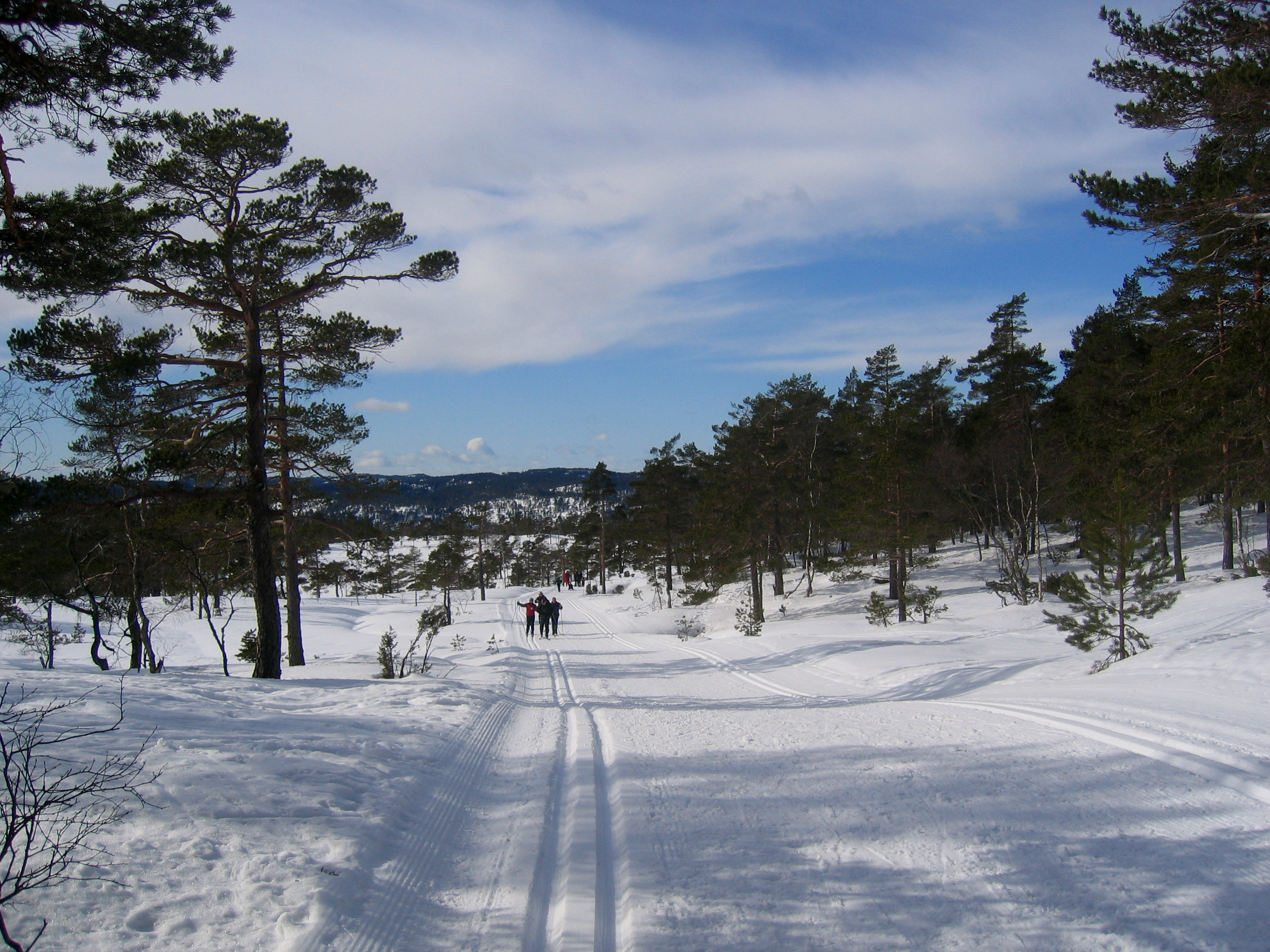 Skiløype ved Orremyra på Øynaheia / Topdalsheia.